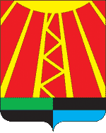 Герб Нефтегорска